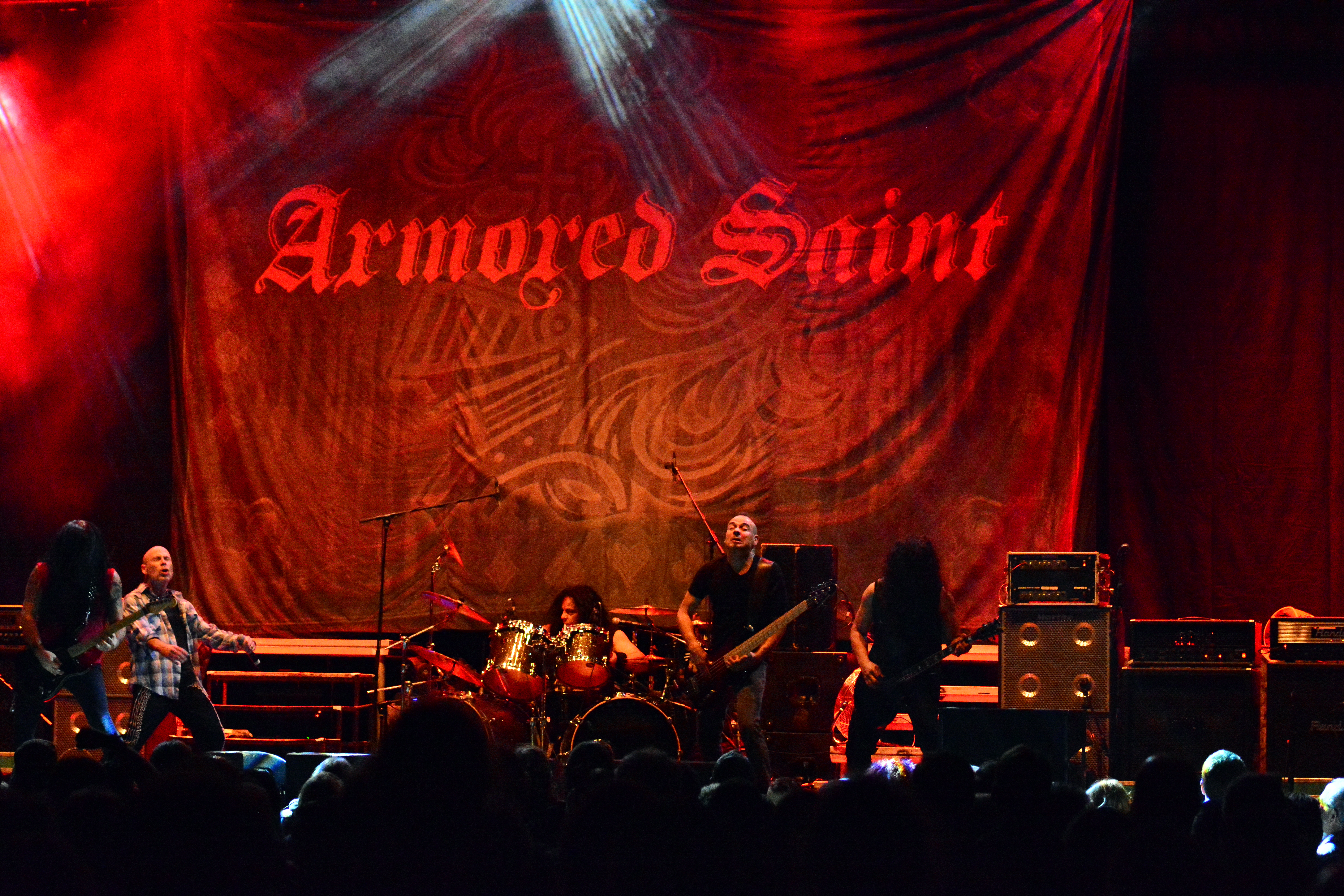 Armored Saint beim Waterkant X-Mas Bash 2015 in der Sporthalle Hamburg